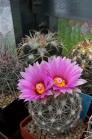 Escobaria vivipara v. arizonica